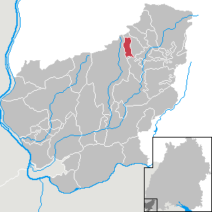 Böllen, Landkreis Lörrach, Baden-Württemberg